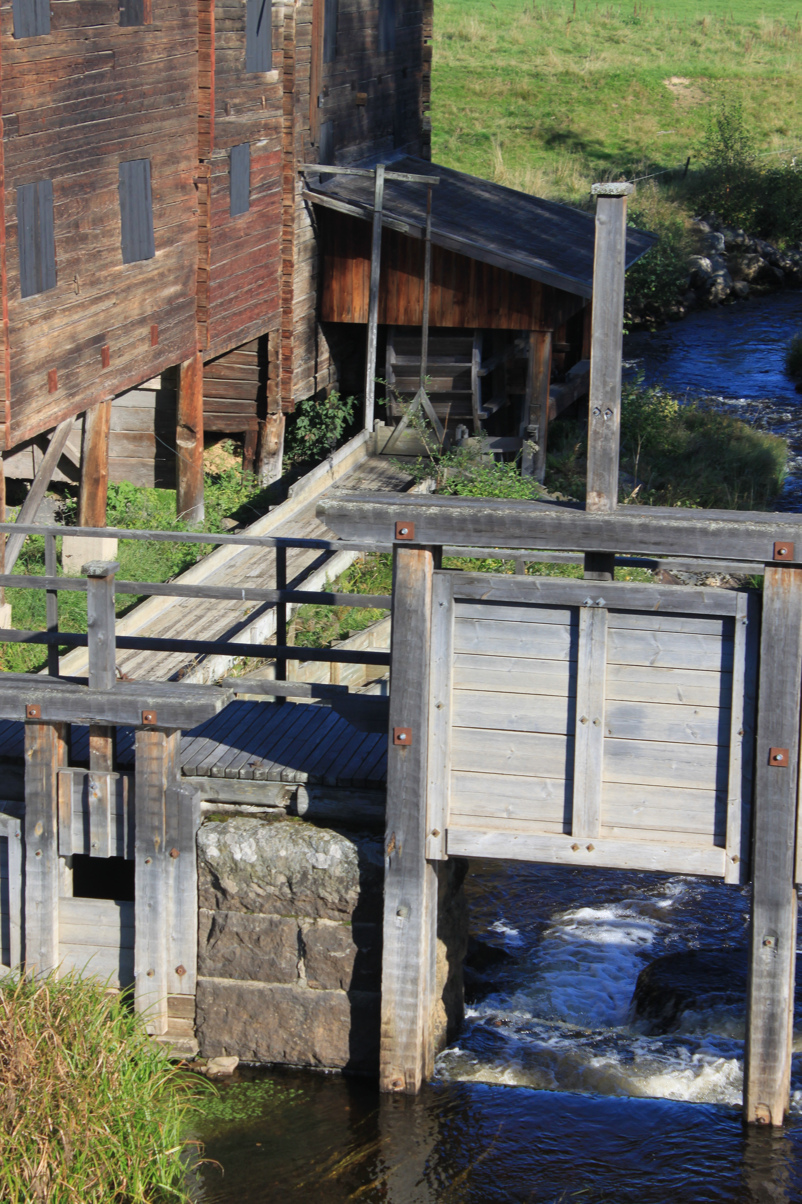 Vattenhjul och en dammlucka. Hians kallas även för Lörängs linskäkt.